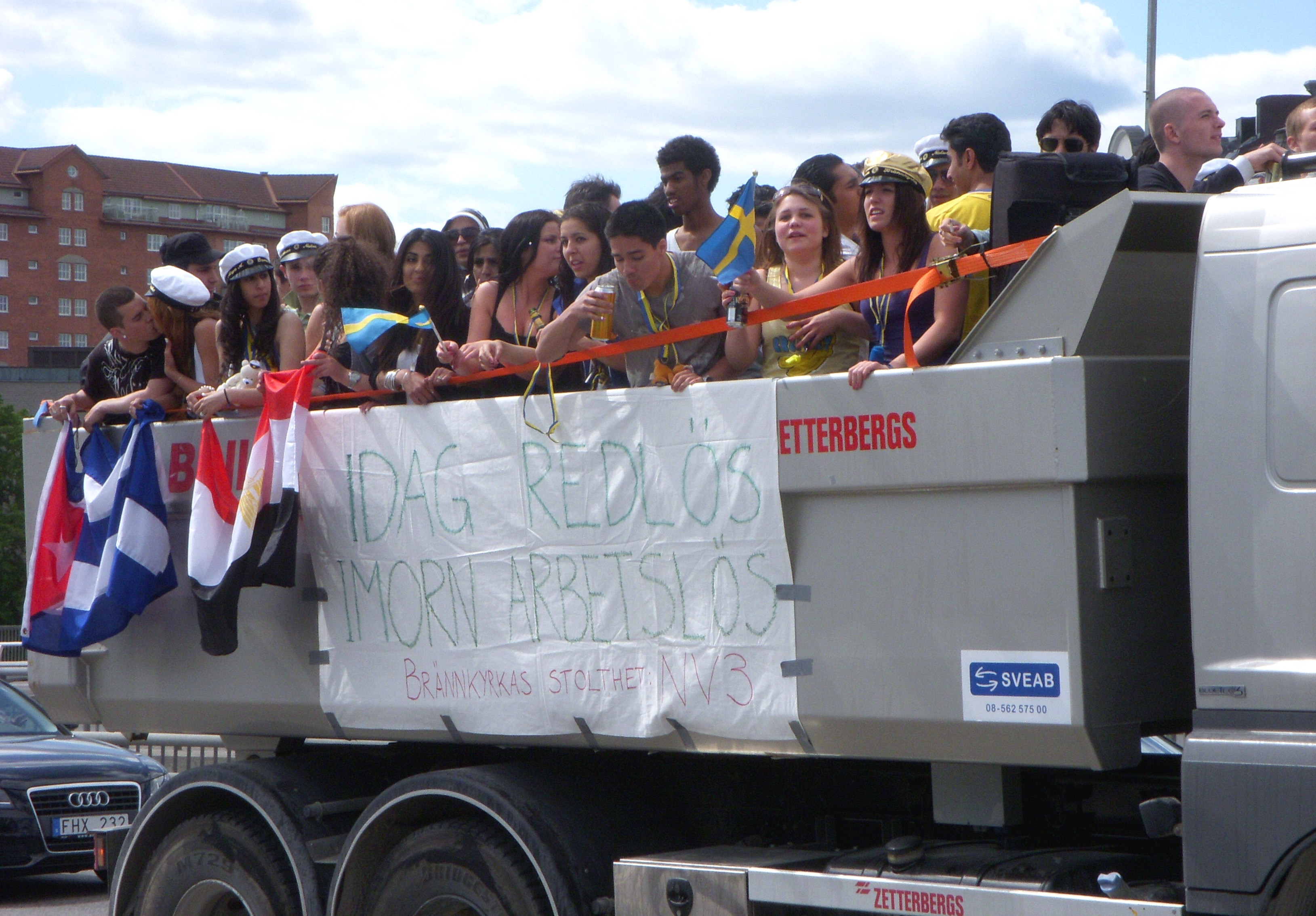 Studentutspring på Liljeholmsbron i Stockholm